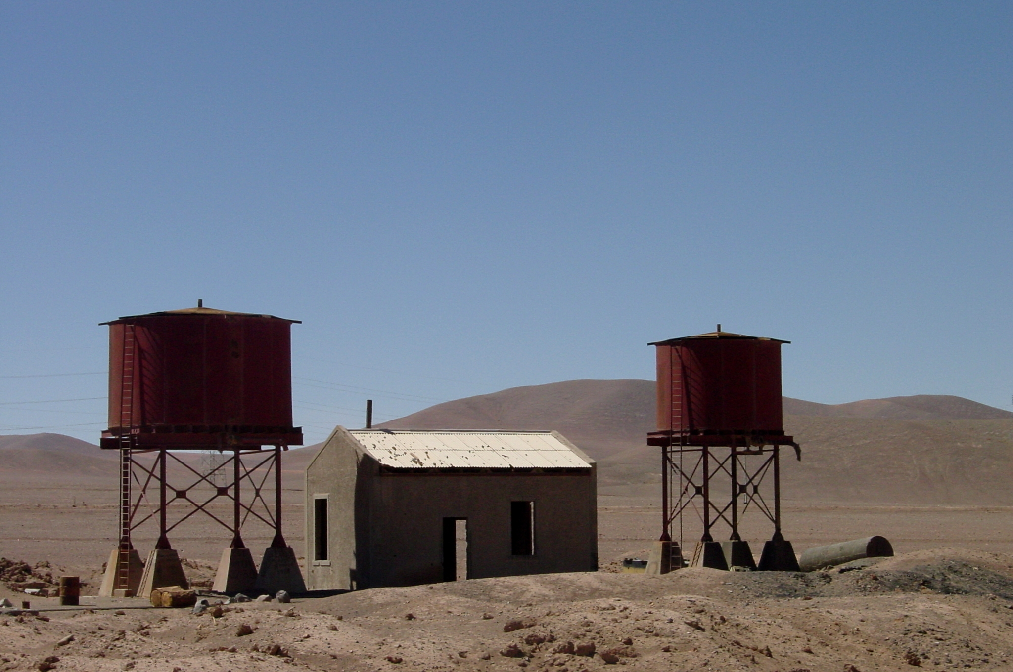 Ancienne station de train située à côté du salar d'imilac, Region II, province d'Antofagasta, Chili. Photo prise depuis la route B-55